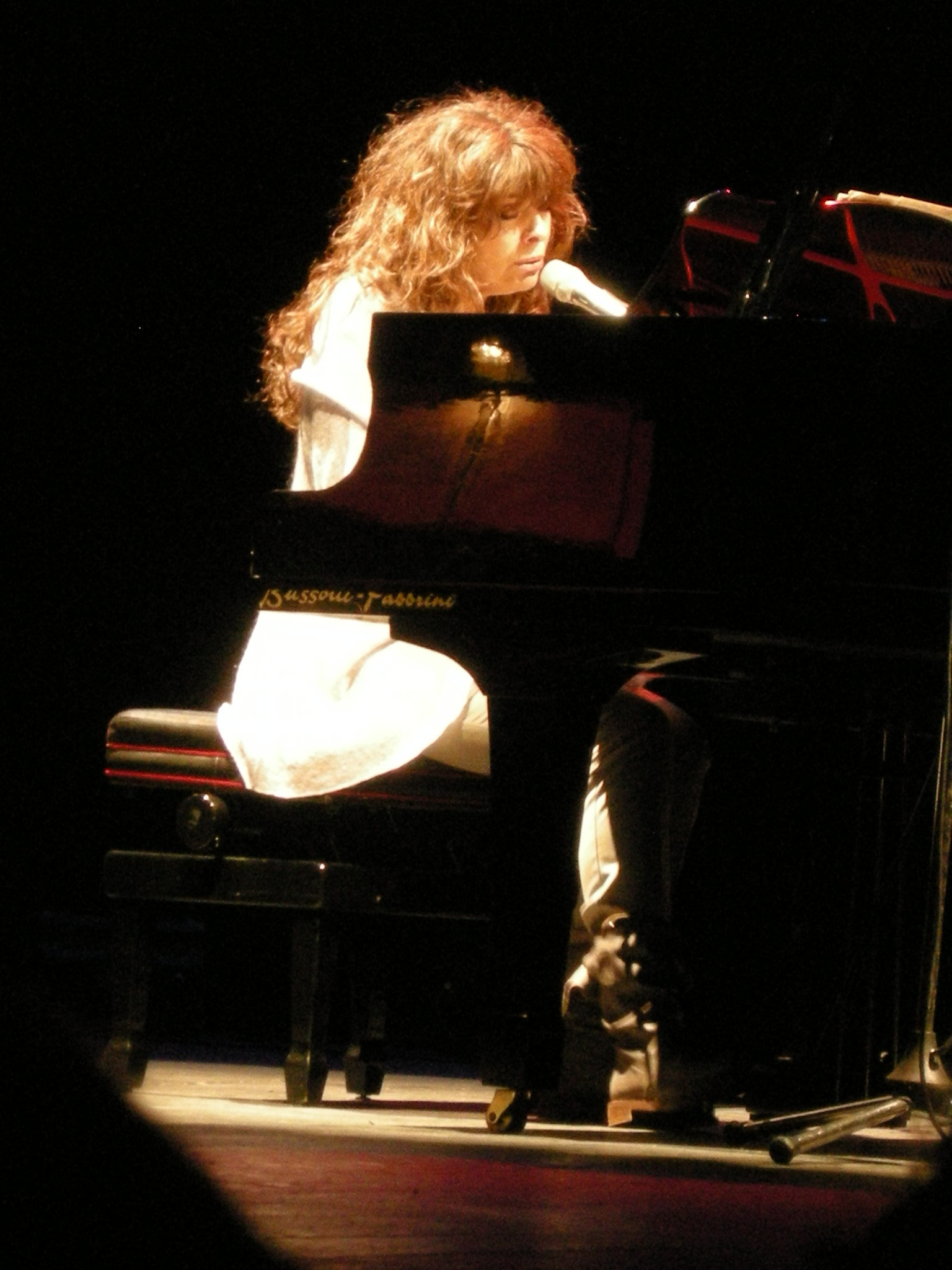 Alice @ Prato 20-03-09, 01